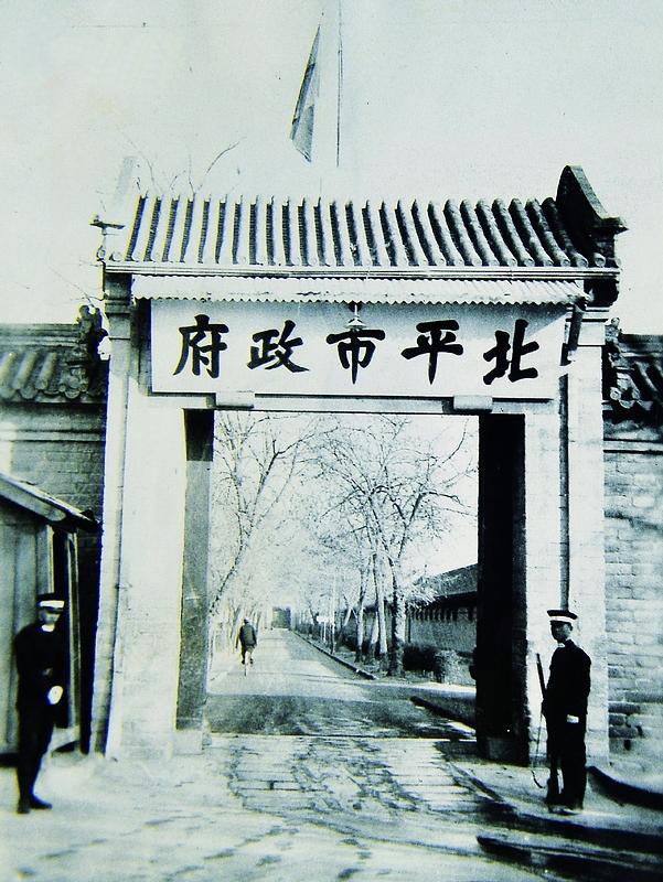 1935年的北平市政府